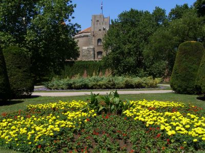 Kalemegdan, Belgrade